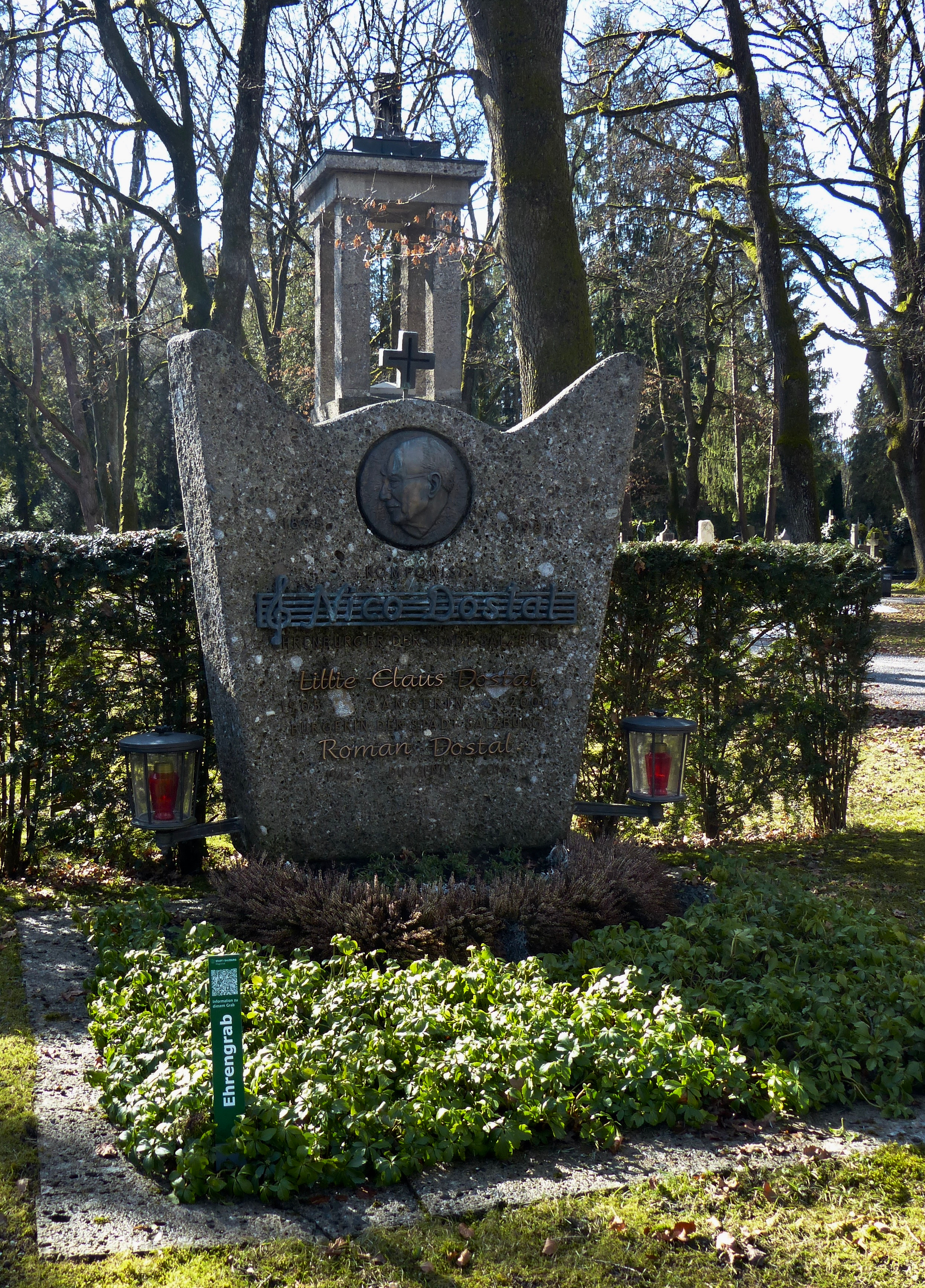 Grabmal Nico Dostal auf dem Salzburger Kommunalfriedhof